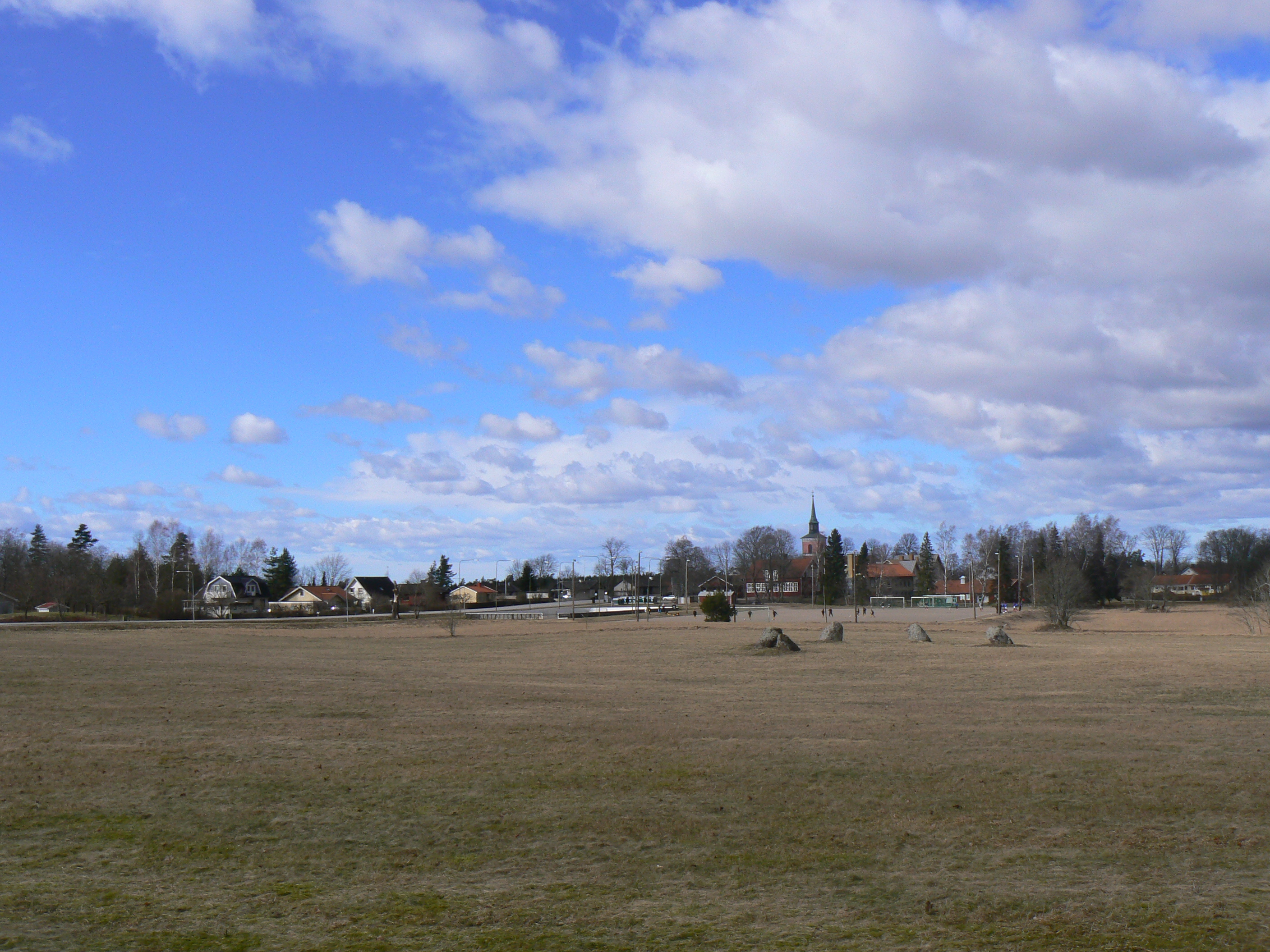 Slaka village close to Linköping, Sweden. Photo by Skvattram 2007-03-17.